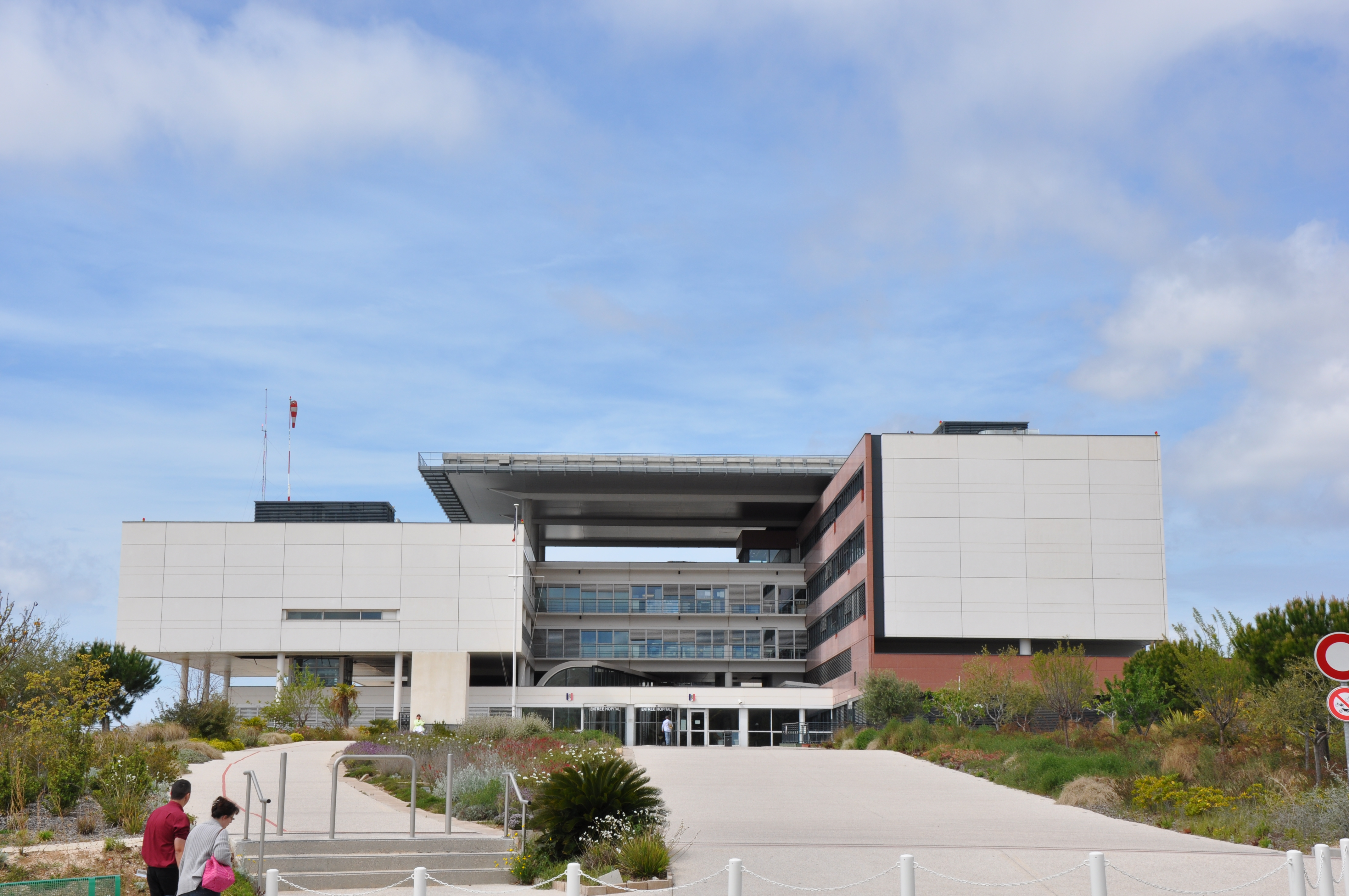 Hopital; Toulon, Provence-Alpes-Côte d'Azur, France